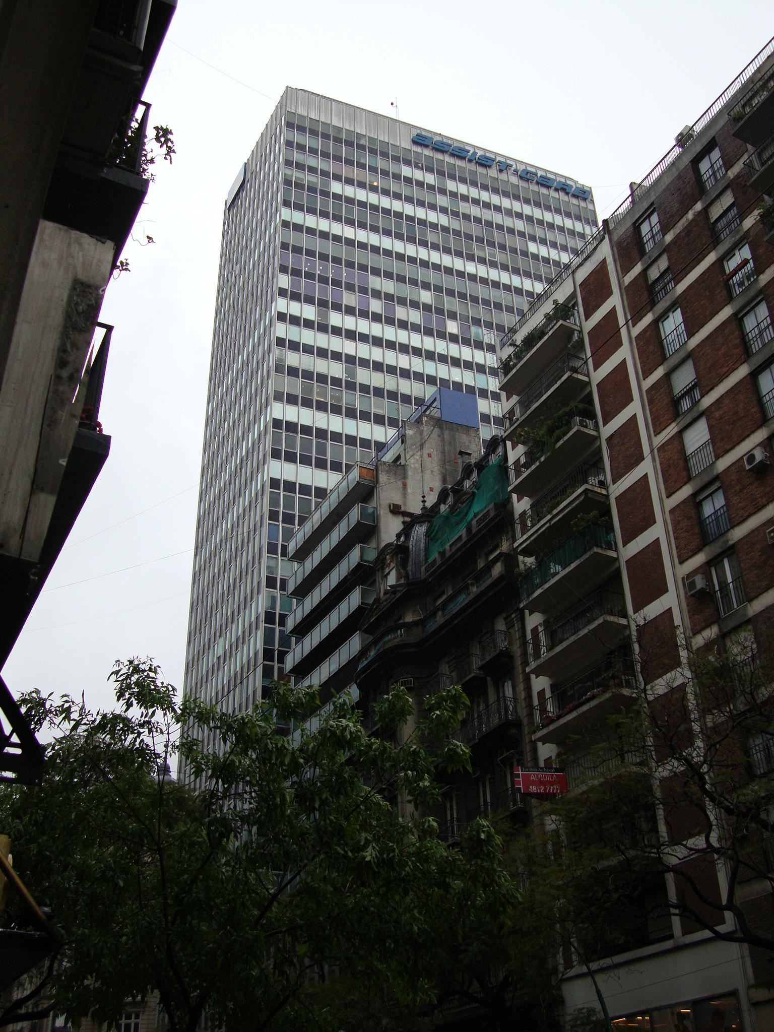 La Torre Brunetta (conocida también como Olivetti), vista desde la Av. Santa Fe. Suipacha 1111, barrio de Retiro. Buenos Aires, Argentina.